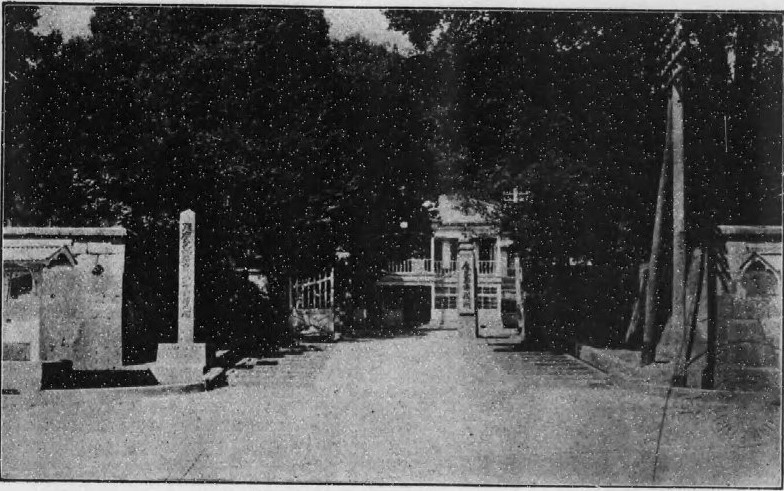 鹿児島市役所初代庁舎（現在の鹿児島市立美術館所在地）の画像。